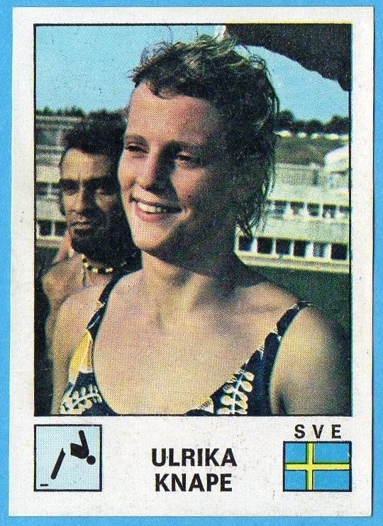 SPORT VEDETTES-PANINI 1974-Figurina n.196- KNAPE - SVEZIA -TUFFI -Rec